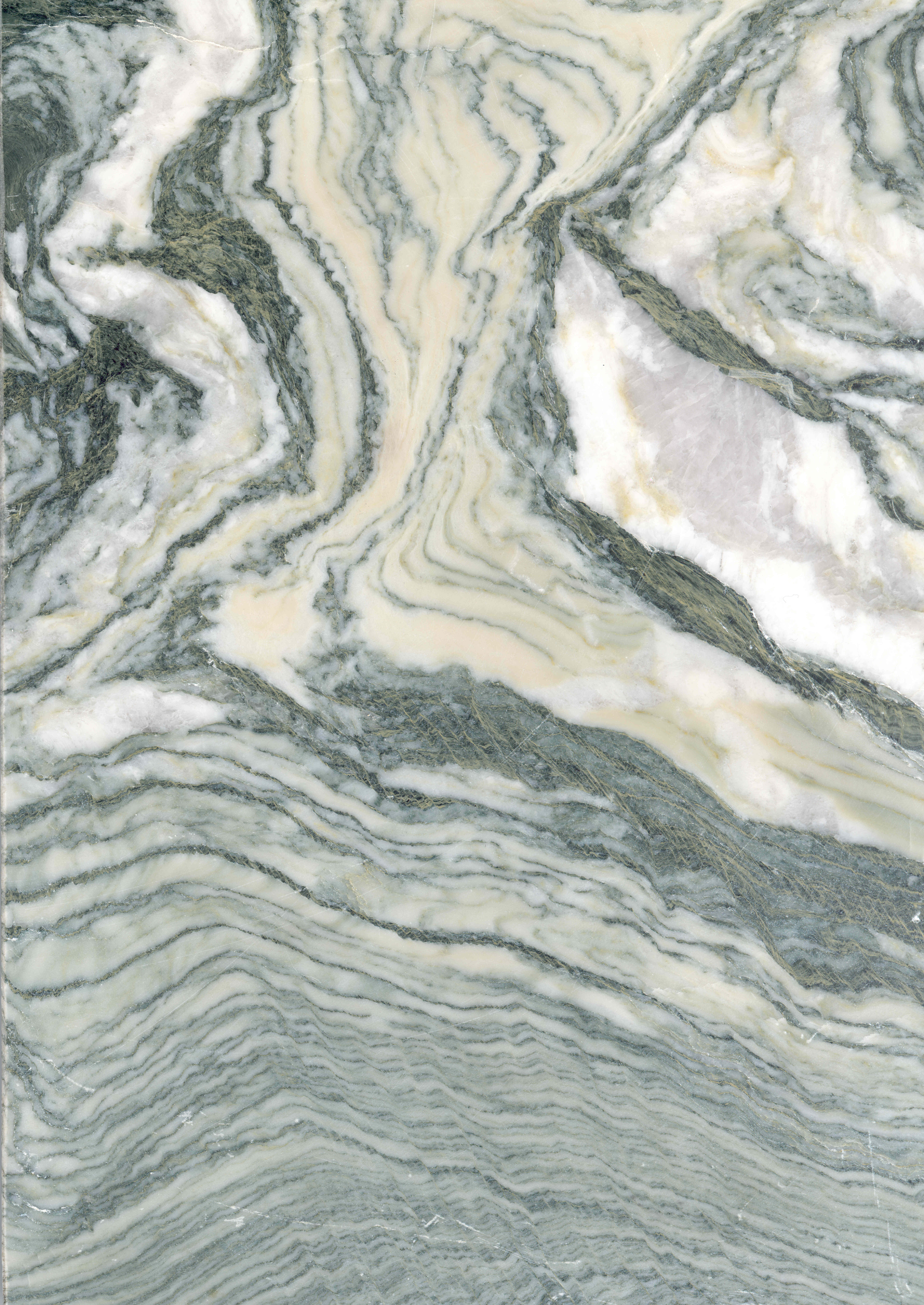 Cipollina, Silikatmarmor, Italien